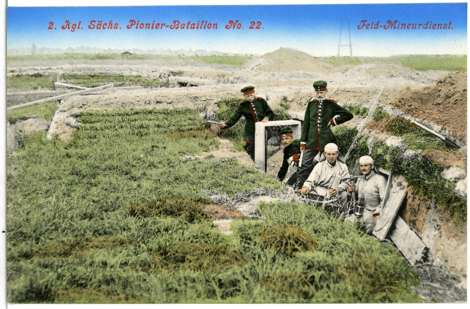 Riesa; 2. Königlich Sächsisches Pionier-Bataillon Nr. 22 - Feld-Mineurdienst Diese Ansichtskarte stammt vom Kunstverlag Brück & Sohn aus Meißen ( Die Karte hat die eindeutige Nummer 02770 und ist in höherer Auflösung beim Verlag erhältlich. Sie wurde im Rahmen einer Kooperation zwischen Wikipedianern und dem Kunstverlag für Wikimedia Commons zur Verfügung gestellt.